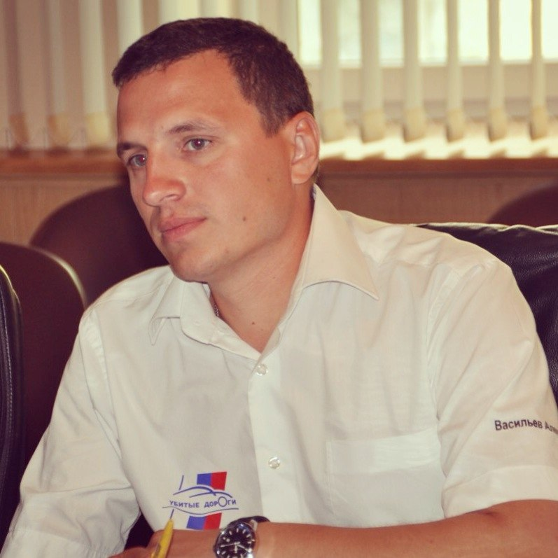 Васильев Александр Николаевич